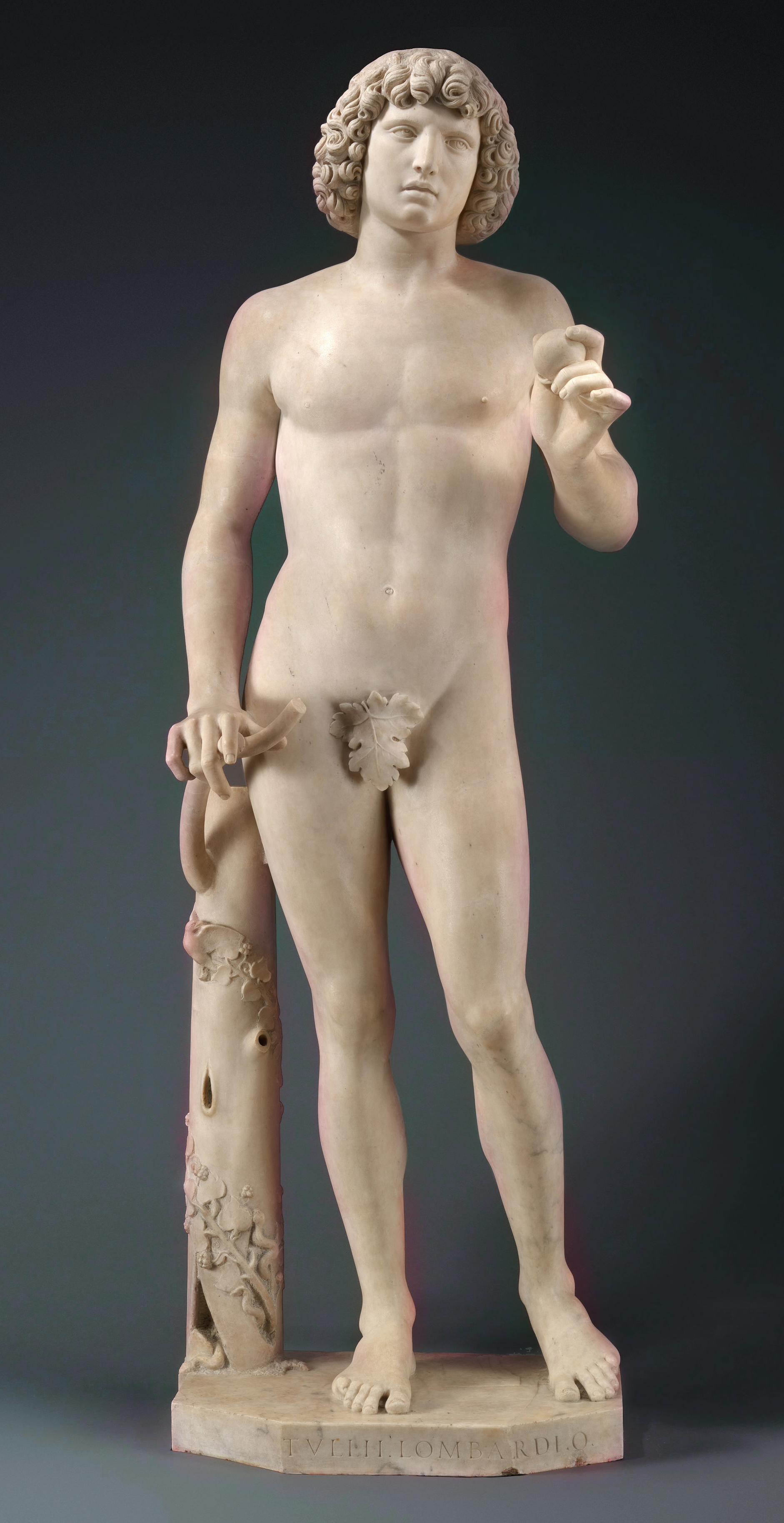 Italian, Venice; Statue; Sculpture